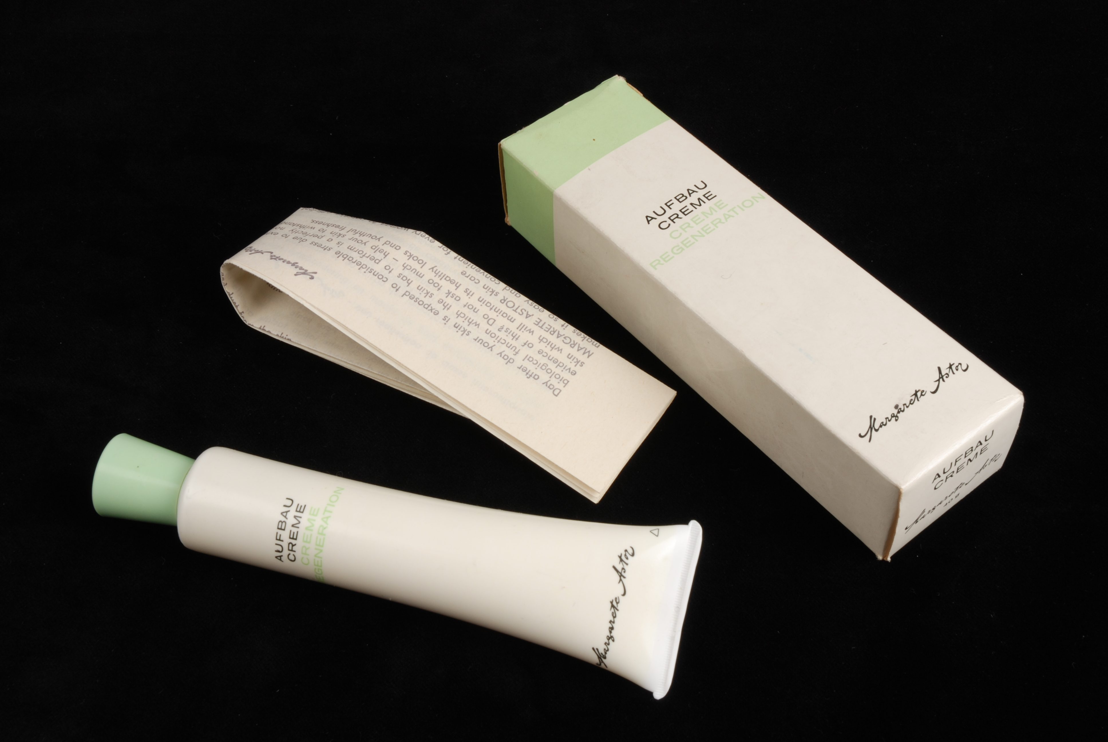 Objectgegevens Titel: Plastic tube, “Margarete Astor”, regenerationcrème in de originele verpakking met bijsluiter, kapper Van Vliet Beschrijving: A: Plastic witte tube met een zachtgroene kunststof schroefdop. Buitenzijde crèmekleurig met zwarte en lichtgroene tekst. B: Bijsluiter van wit papier met grijze tekst. C: Hoog smal kartonnen doosje met sluitflappen onder en boven. Fond wit met zachtgroen, en tekst in zwart en lichtgroen. Herkomst: Afkomstig uit de inboedel van kapsalon Van Vliet aan de Wolphaertsbocht in Rotterdam-Charlois. Opgericht in 1933 en na het overlijden van de eigenaar in 1973 gesloten. De echtgenote deed de verkoop van parfums, bijous, lichaamsproducten en dergelijke in een kleine ruimte vooraan in de zaak met toonbank en vitrine. Waarschijnlijk afkomstig uit ladenkastjes en vitrines vooraan. Volle doosjes met bijous en dergelijke stonden in een ingebouwde kast achter in de kapsalon. Trefwoorden: tube, doos, productverpakking, houder Opschrift / merk: A: "Margarete Astor / aufbau creme / creme regeneration / regeneration cream". B: bijsluiter in vier talen: "Margarete Astor Kosmetik / Uw huid is dagelijks ... Bovendien is deze crème een ideale basis voor de make up.". C: ""Margarete Astor / aufbau creme / creme regeneration / regeneration cream / 40 g". Vervaardiger: Margarete Astor Plaats vervaardiging: Duitsland, Mainz Datering: 1955 - 1970 Materiaal: kunststof, plastic, karton, papier Afmetingen: (cm) doos: hg 14,5 / br 4,0 / dp 3,0 Associatie: verpakken, reclame, Rotterdam, Charlois, Wolphaertsbocht, kapper, Van Vliet, verkoop, winkelvoorraad, vrouw, verkoop Vorm & decoratie: verpakking Inventarisnr: Museum Rotterdam 84668-4.A-C